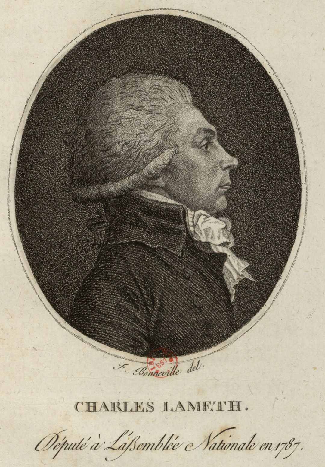 Charles Lameth député à l'Assemblée nationale en 1787 (estampe).